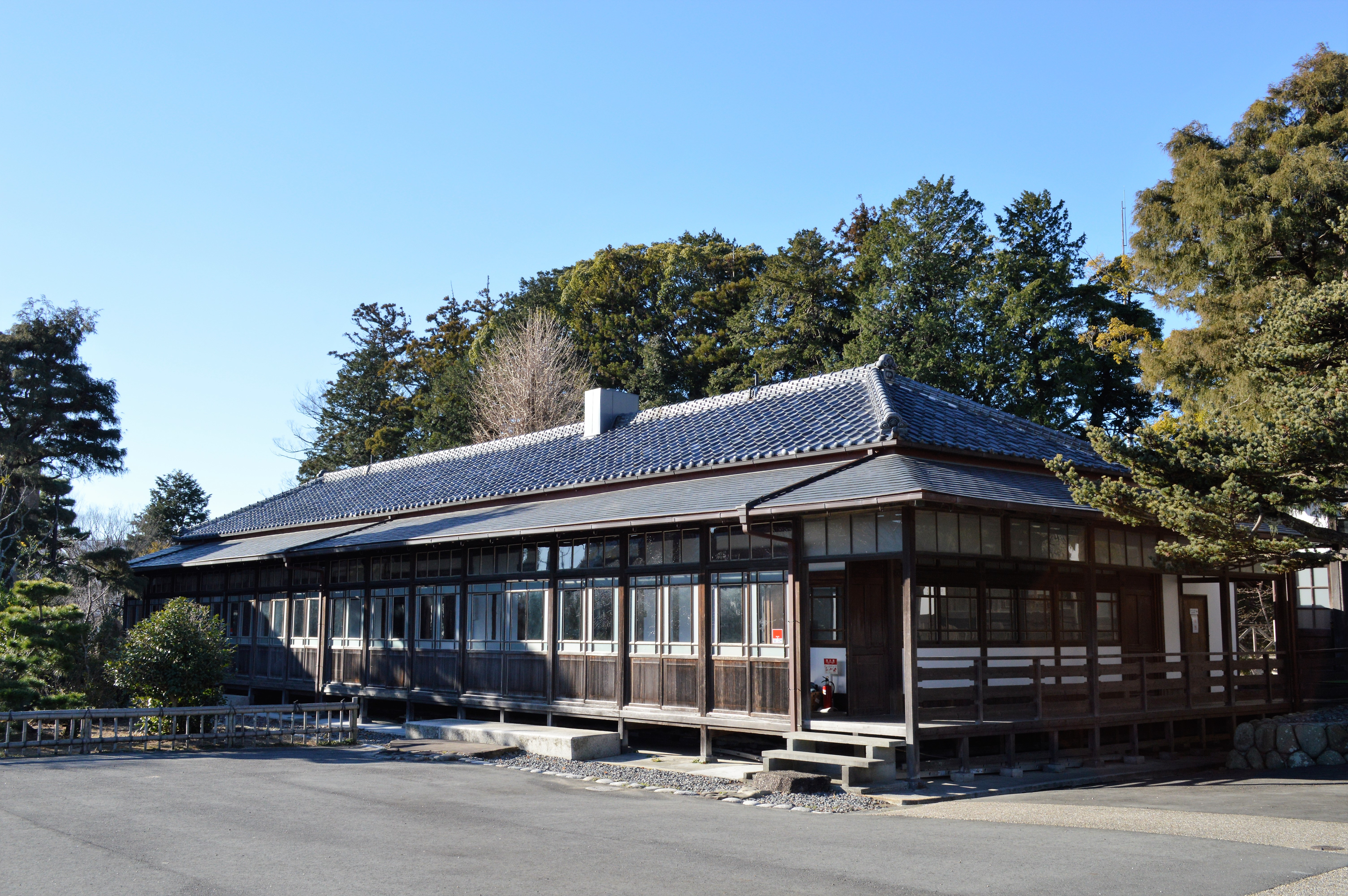 大日本報徳社仰徳記念館。